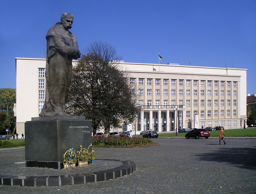 Uzhhorod, Ukraine, Oblast adminstration and monument of Taras Shevchenko author: Elke Wetzig (elya) date: 2004-10-19 Uschhorod, Ukraine, Oblastverwaltung und Denkmal Taras Schewtschenko Fotografin: Elke Wetzig Aufnahmedatum: 19. 10. 2004